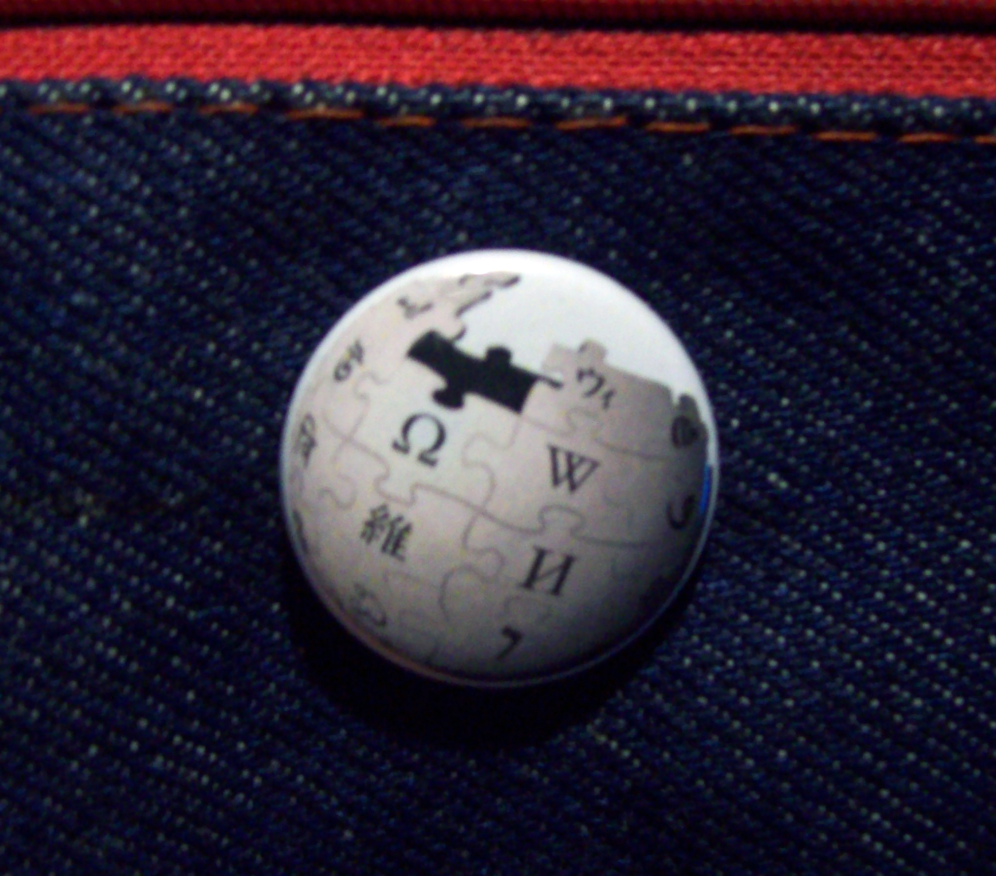 Logo de Wikipedia en un pin de cartuchera.